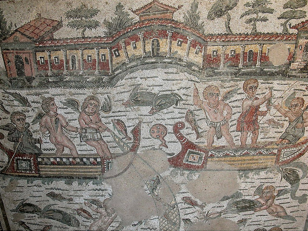 Mosaici Piazza Armerina